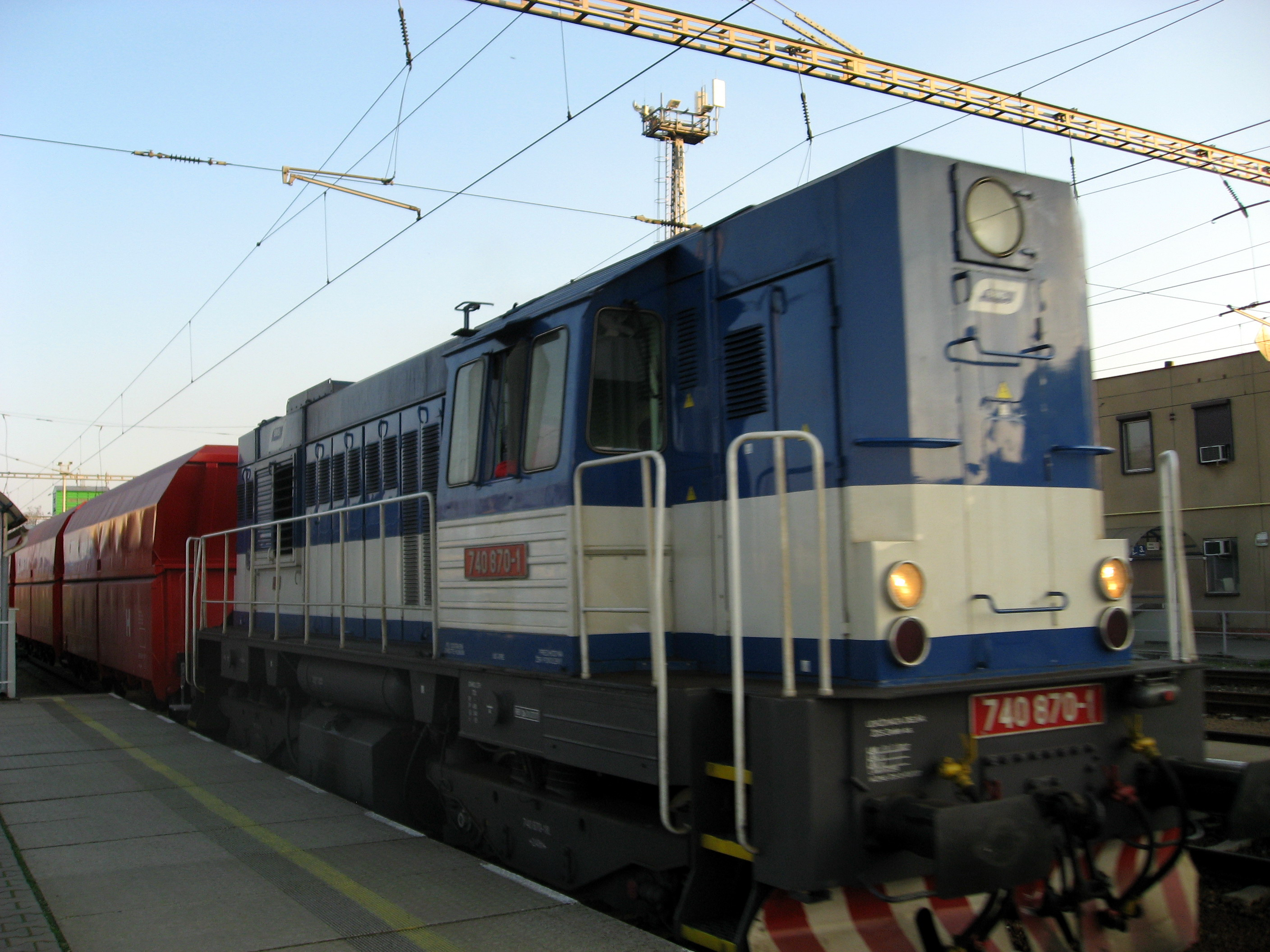 Lokomotiva 740 v Podivíně